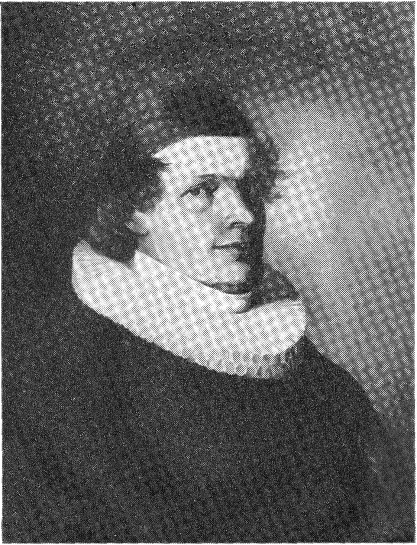 Hans Riddervold (1796–1873).